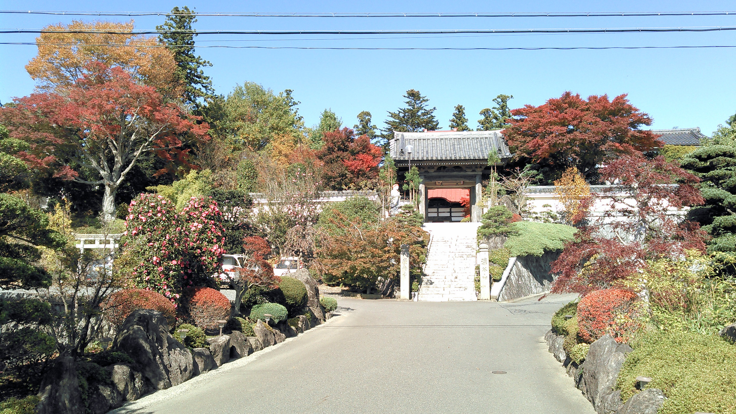 郡山市片平町の三ヶ寺 広修寺 秋の様子